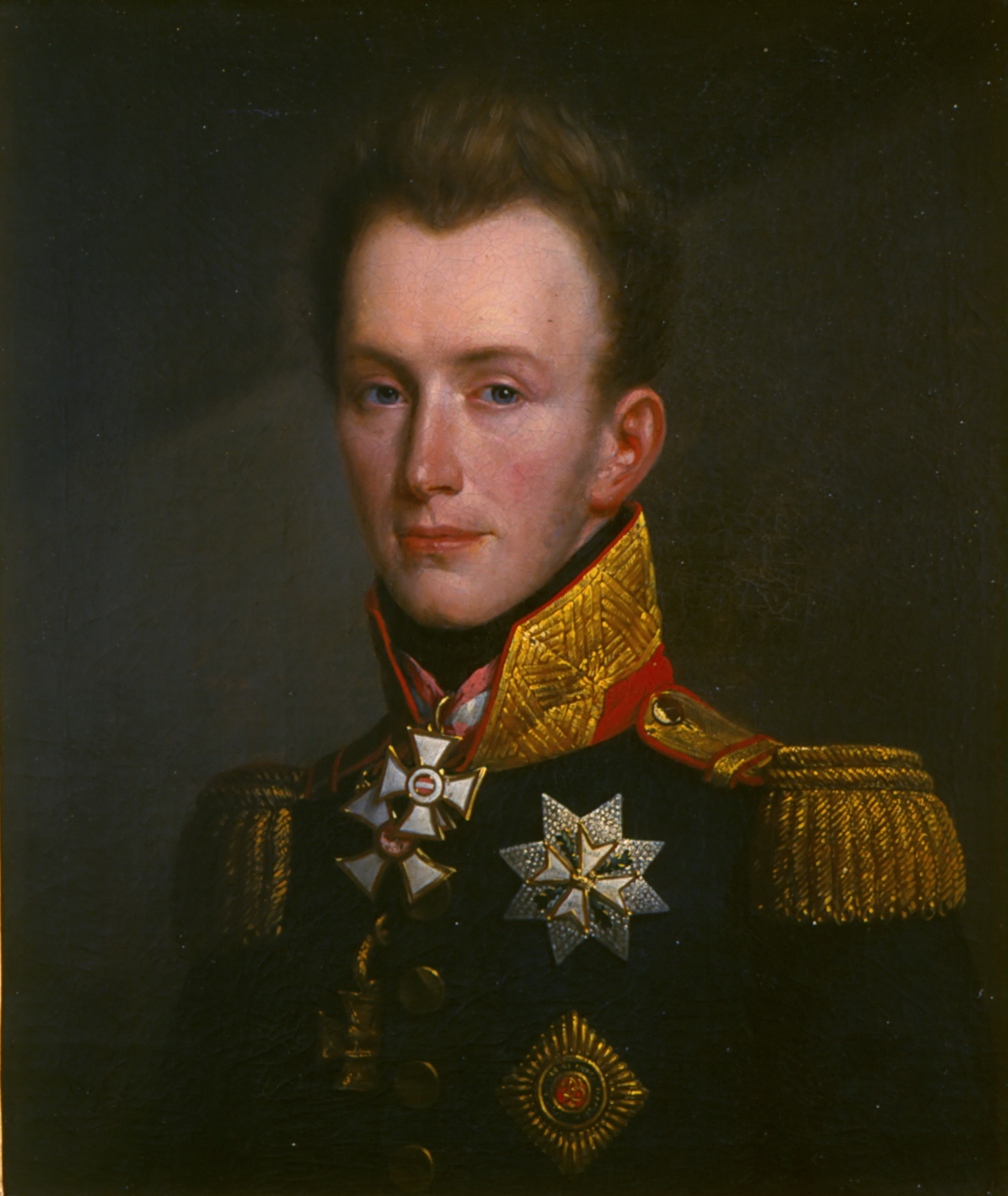 Schilderij van een jonge koning Willem II (overleden 1849), waarschijnlijk geschilderd omstreeks 1815.